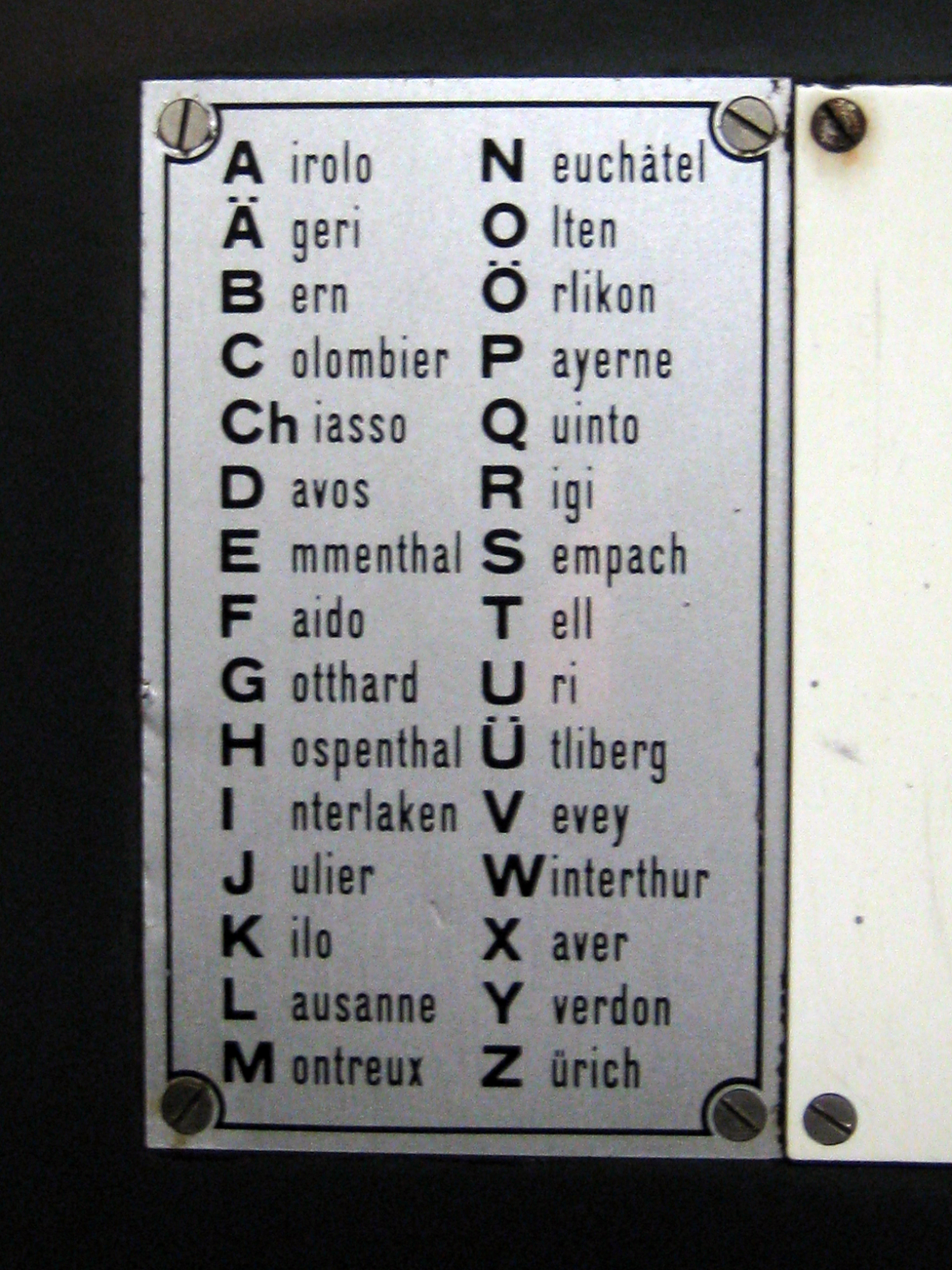 Festungsmuseum Crestawald, Buchstabiertabelle bei Telefon